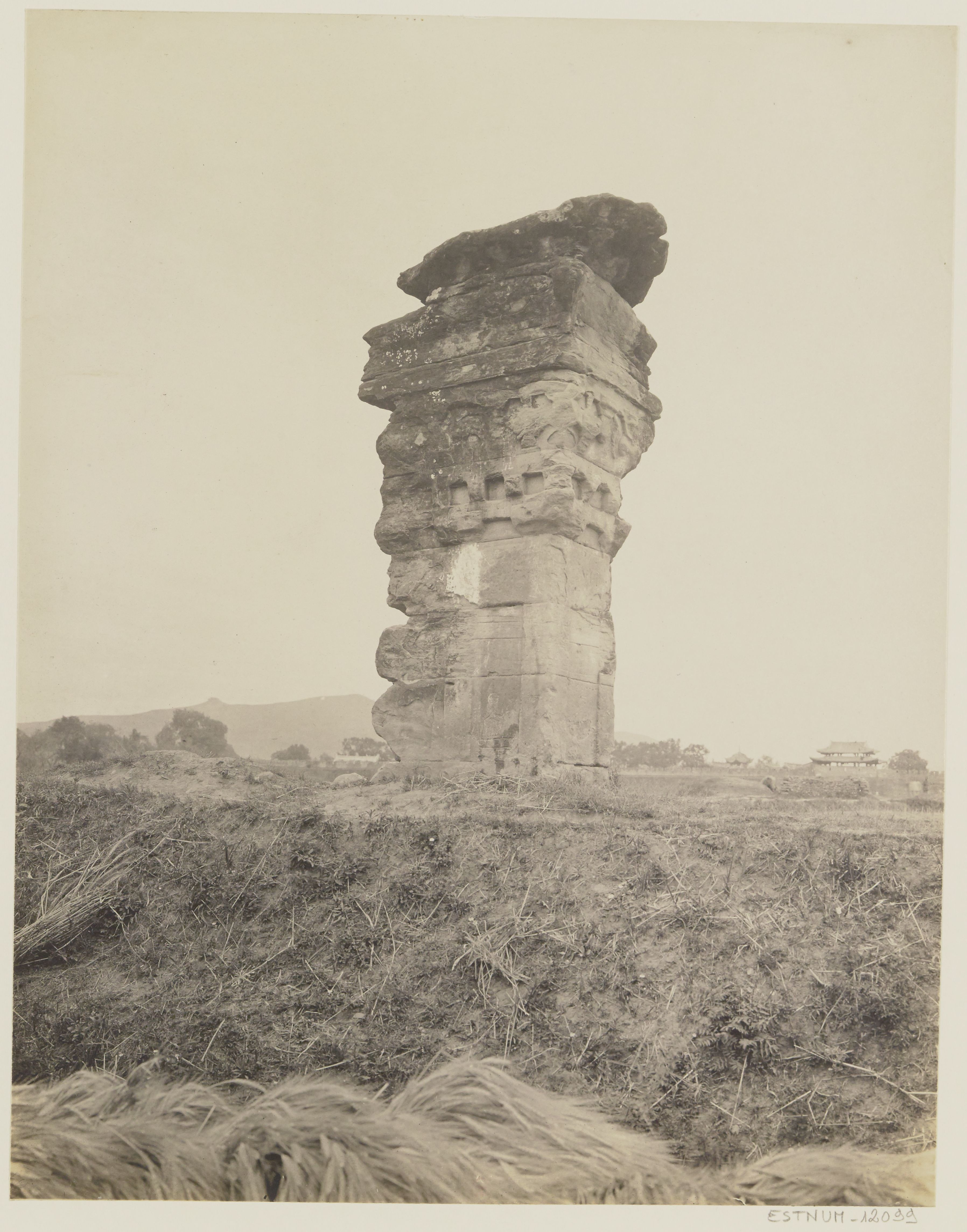 中文（台灣）: 梓潼漢代四闕